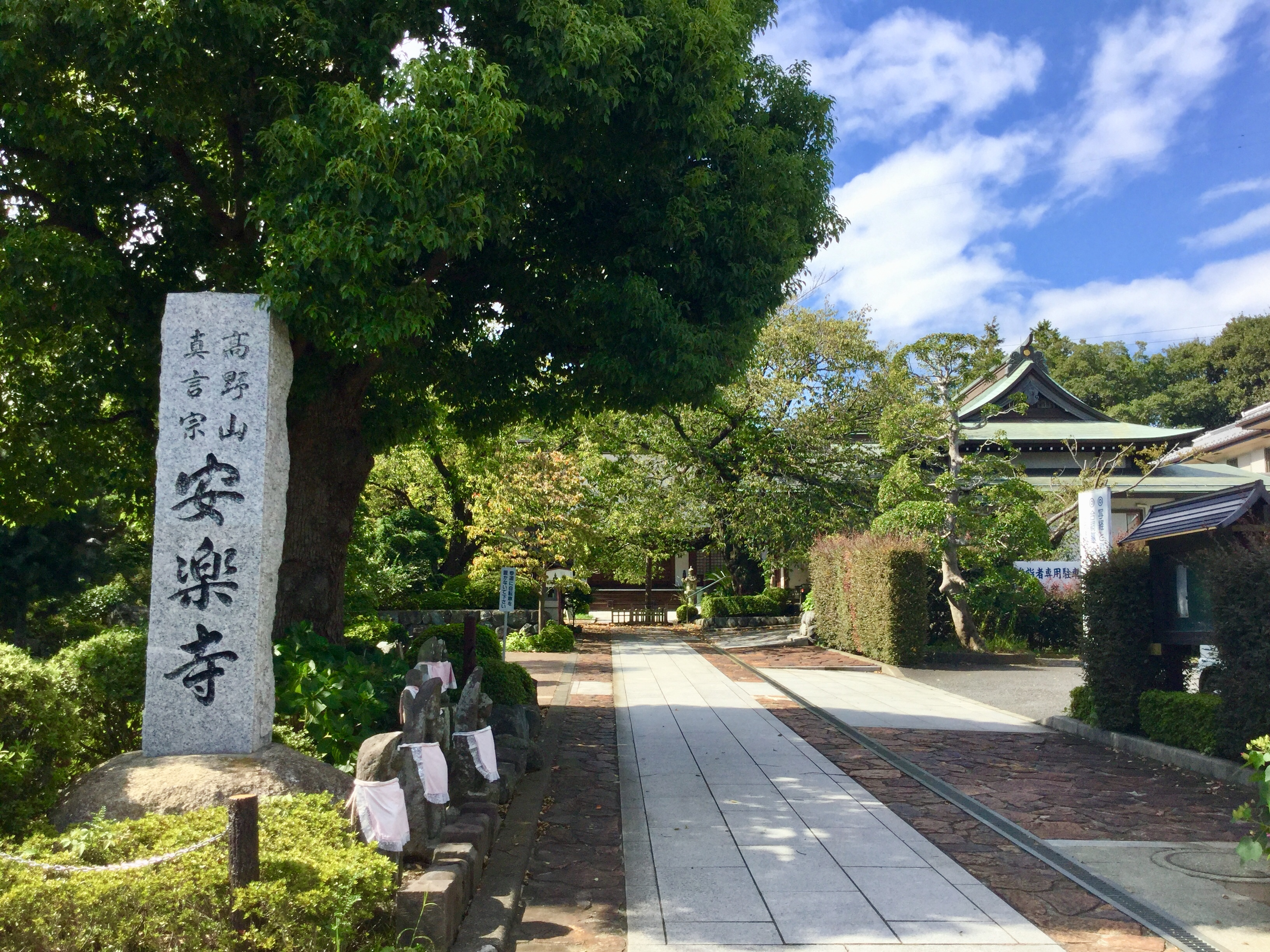 神奈川県寒川町にある安楽寺